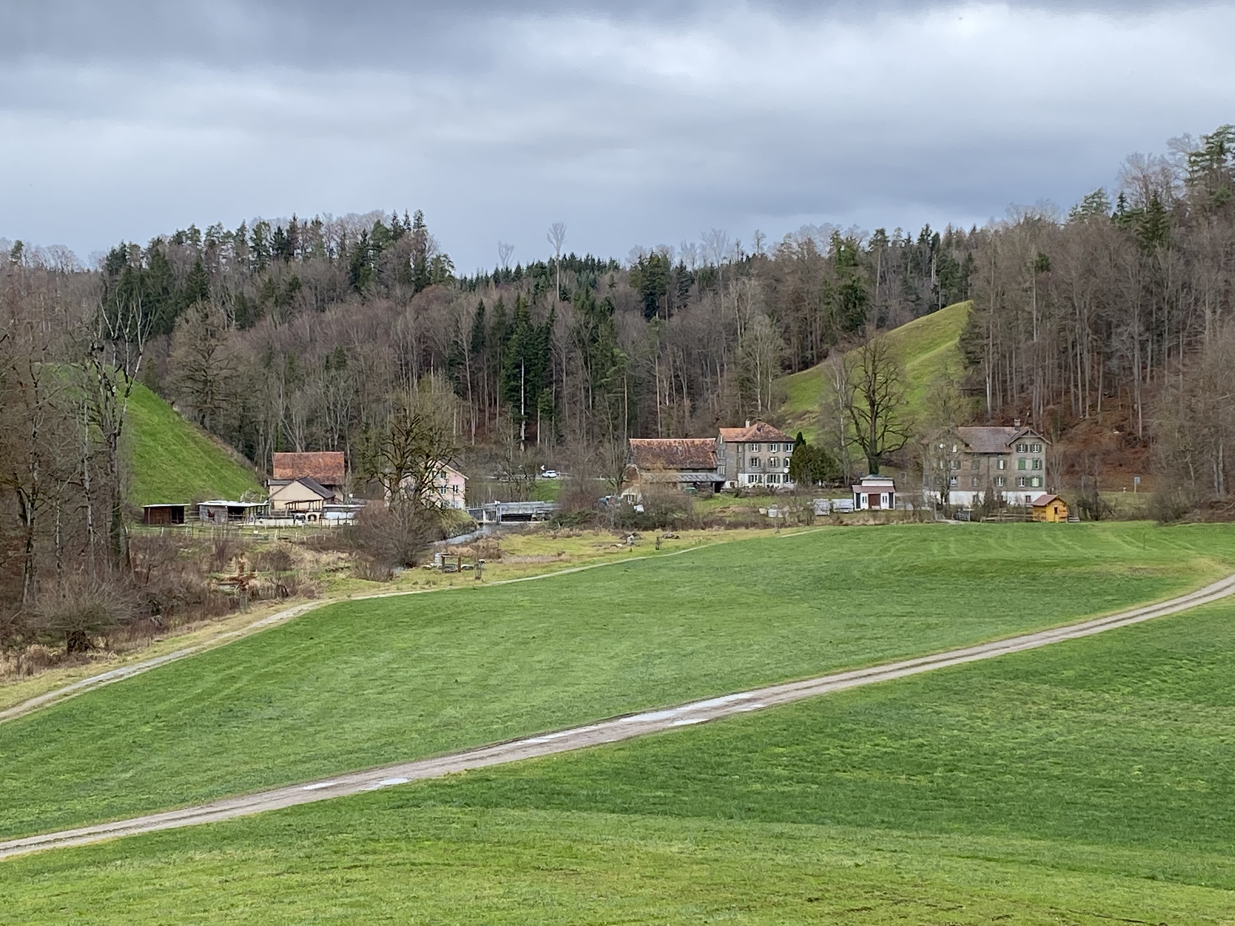 Blick auf Isenhammer